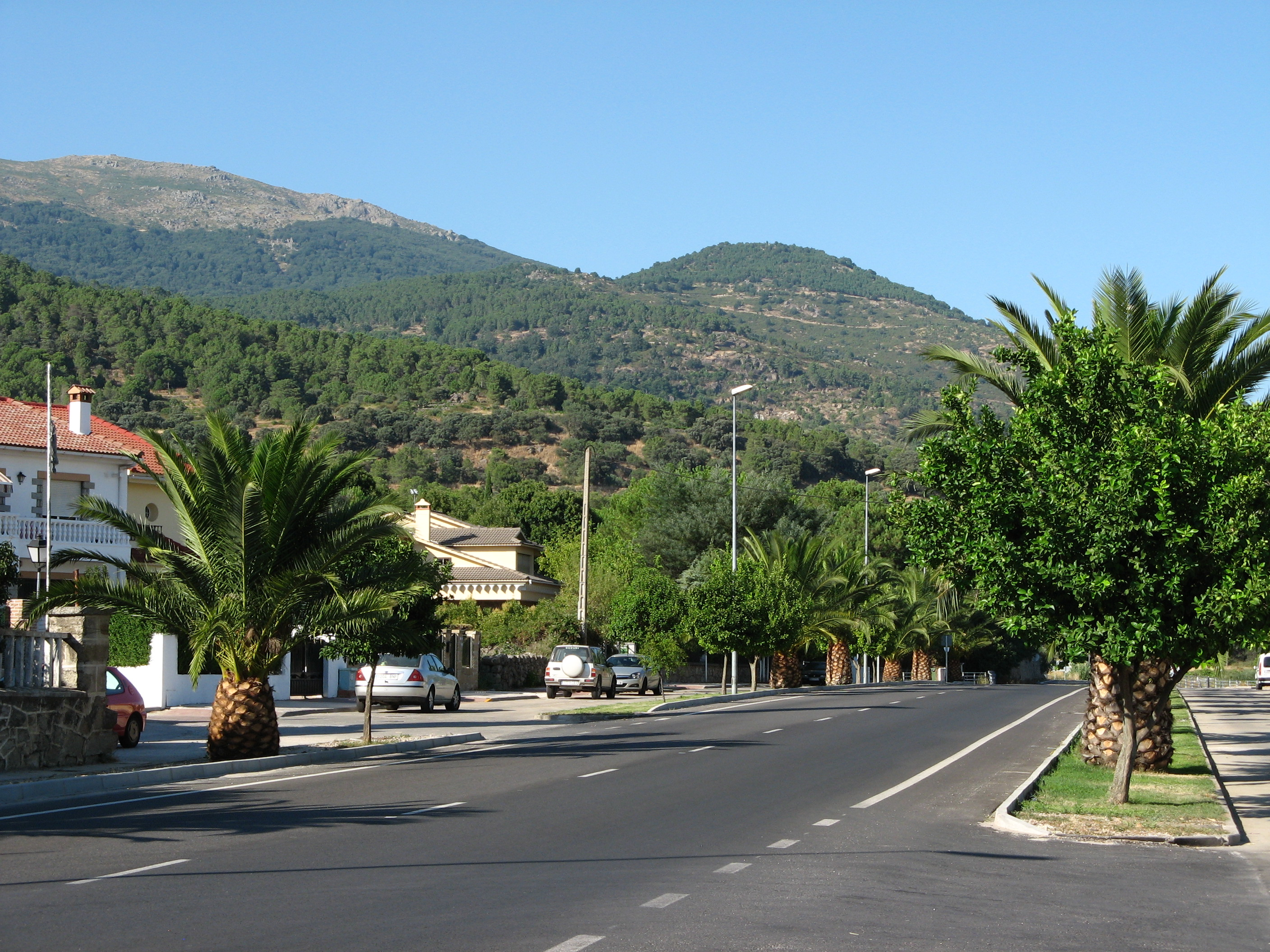 Carretera CL-501 Sotillo de la Adrada. Provincia de Ávila. Castilla y León España